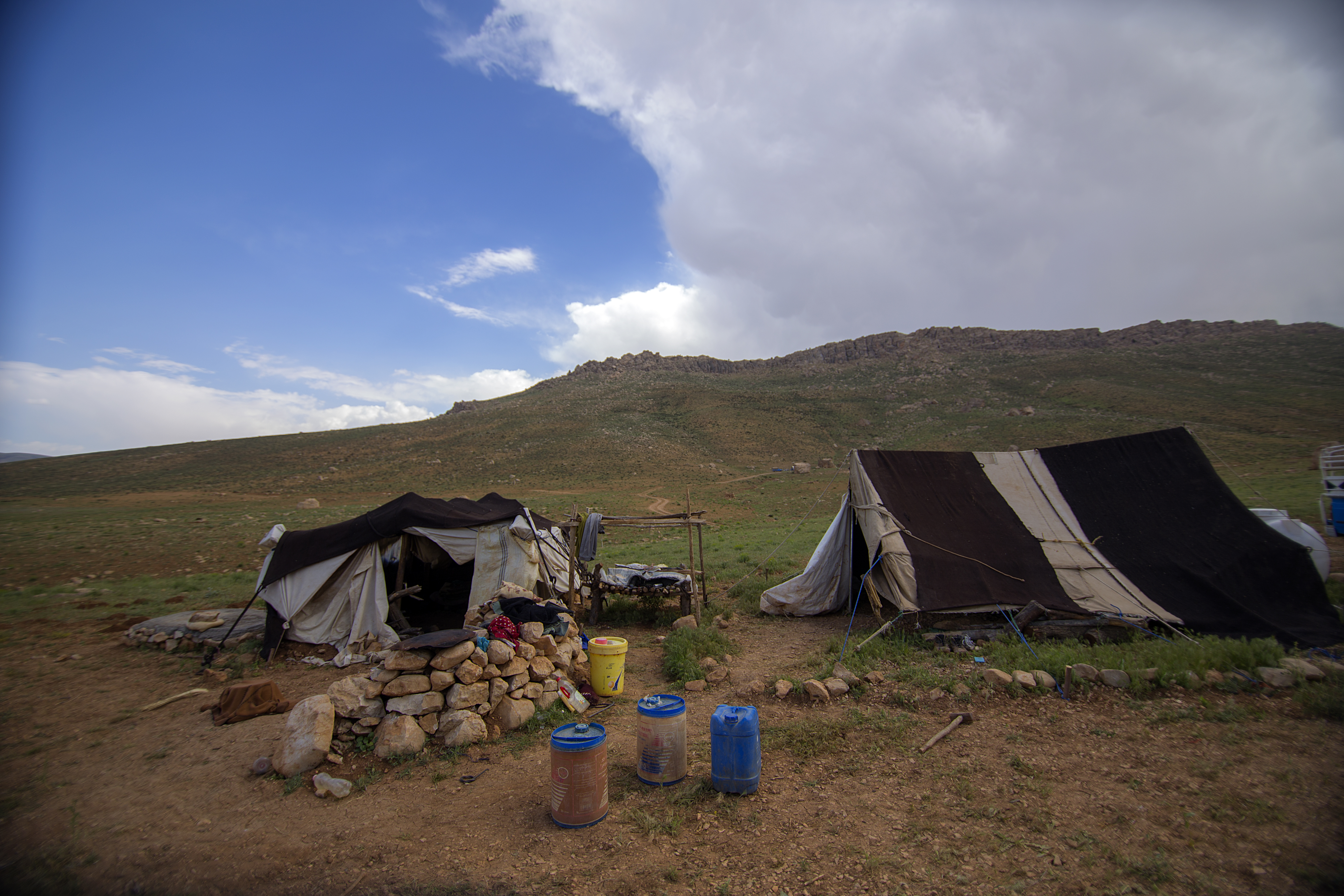 بعضی علت نامگذاری روستا را موقعیت توپوگرافی آن می‌دانند، به طوری که نام اولیه این روستا «خور» به معنای جای گود بوده و این نام به «حفر» و سپس به «خفر» تبدیل شده‌است. همچنین دو امامزاده در این روستا است. روایت دوم کلمه خفر را برگرفته از خور یا غور می‌داند. غور یا غوری نام قبیله یا مردمان اولیه‌ای می‌باشد که در این محل سکونت داشته‌اند. برخی نیز این لغت را برگرفته از گور یا گبر می‌دانند که خود آیینی قبل از اسلام را در منطقه معرفی می‌نماید. روستای خفر به «عروس دنا» نیز معروف است.